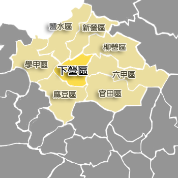 下營區相對位置